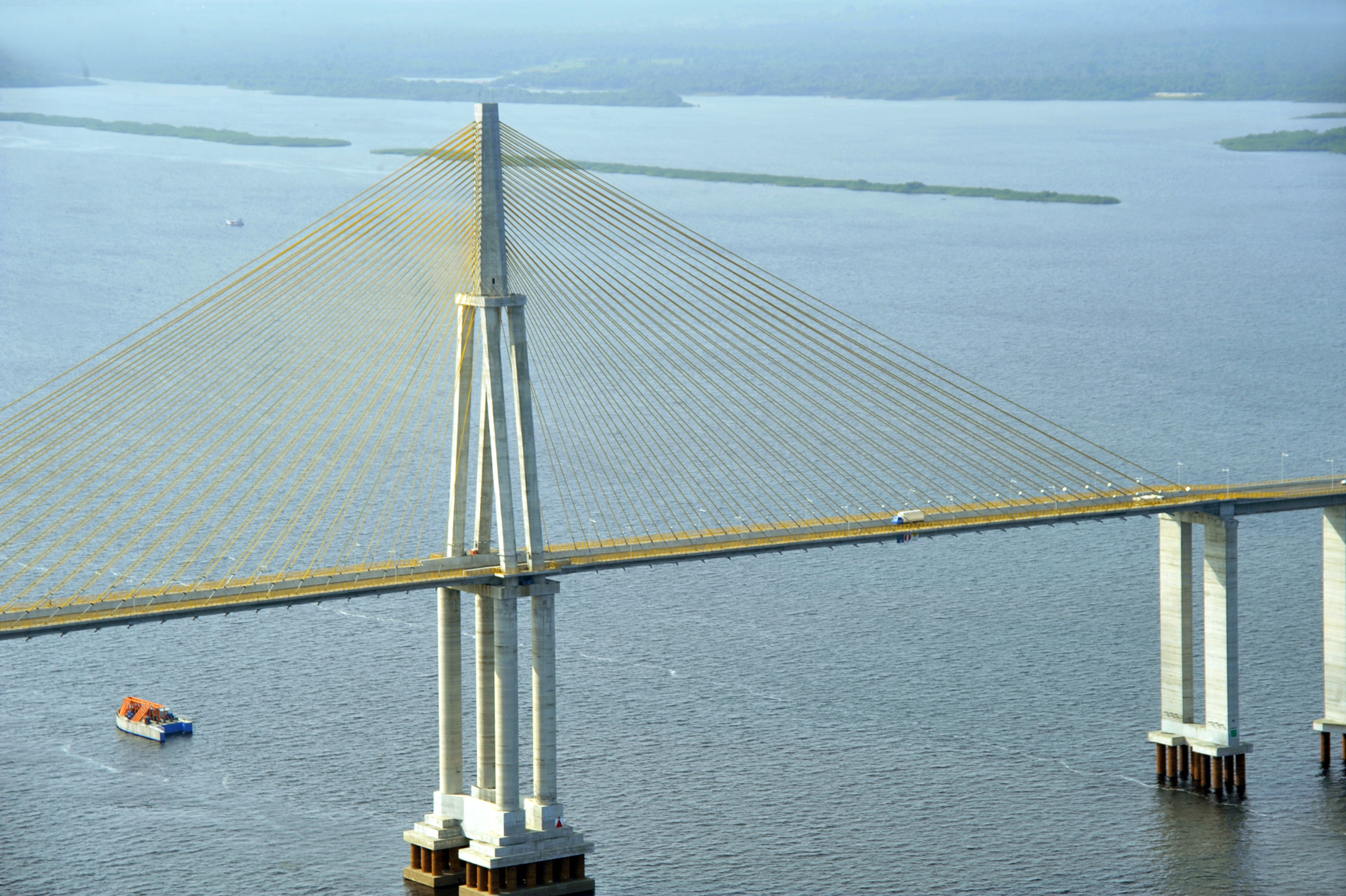 Paricatuba e Iranduba, 26/09/2012 Foto: Tereza Sobreira